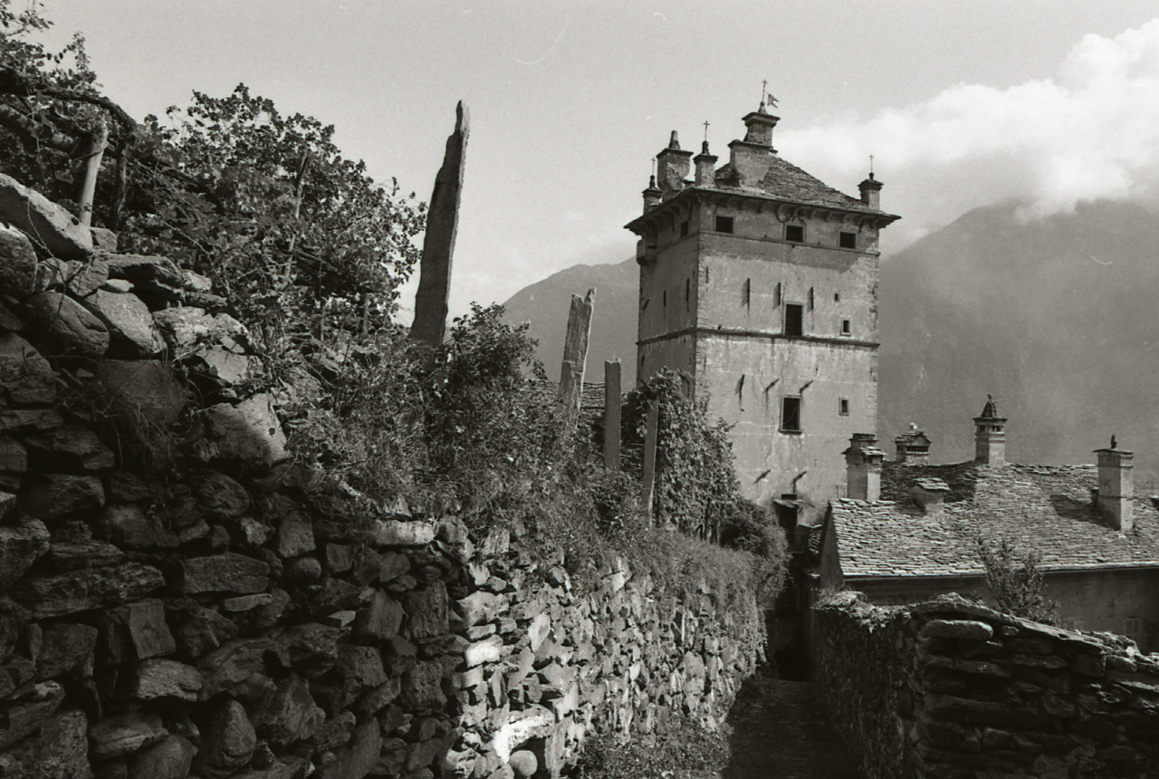 Servizio fotografico : Piedimulera, 1982 / Paolo Monti. - Strisce: 3, Fotogrammi complessivi: 14 : Negativo b/n, gelatina bromuro d'argento/ pellicola ; 35 mm. - ((Sul portanegativi: N[I]K[MA]T FP4 e iscrizione: "Piedimulera 24-37". - Confronta scheda 3852Lpbn24-37. - Occasione: Documentazione per la pubblicazione. - Agenda di Paolo Monti: Nikon Leika 3001-/ Monti 1978 (1978-1982), presso Archivio Paolo Monti. - Fonte